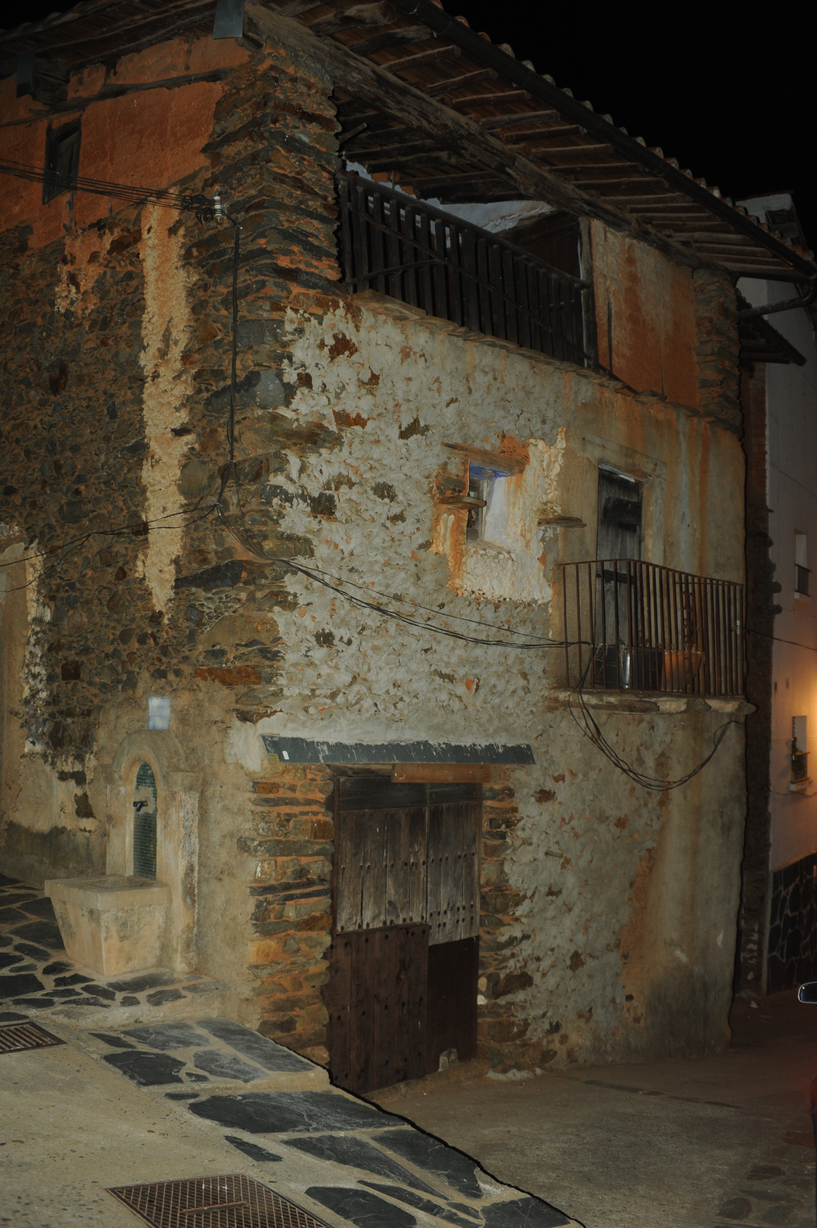 Construcción típica de la Sierra de Gata. Descargamaría (Cáceres)